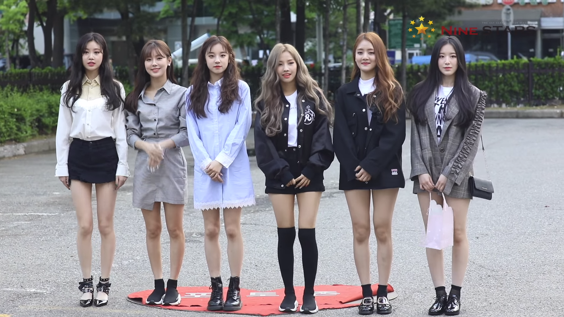 5월 4일 오전 KBS 뮤직뱅크에 (여자)아이들이 리허설 녹화에 참여하기 위해 출근하고 있다.